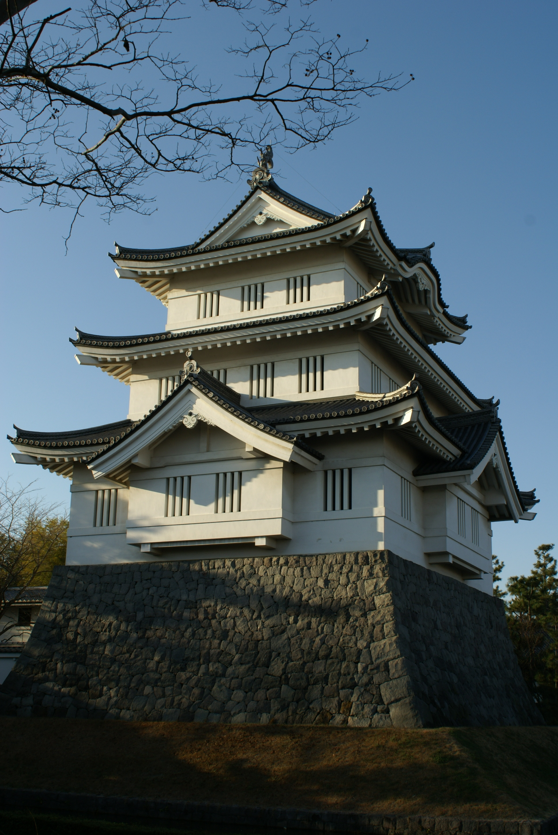 忍城復興御三階櫓